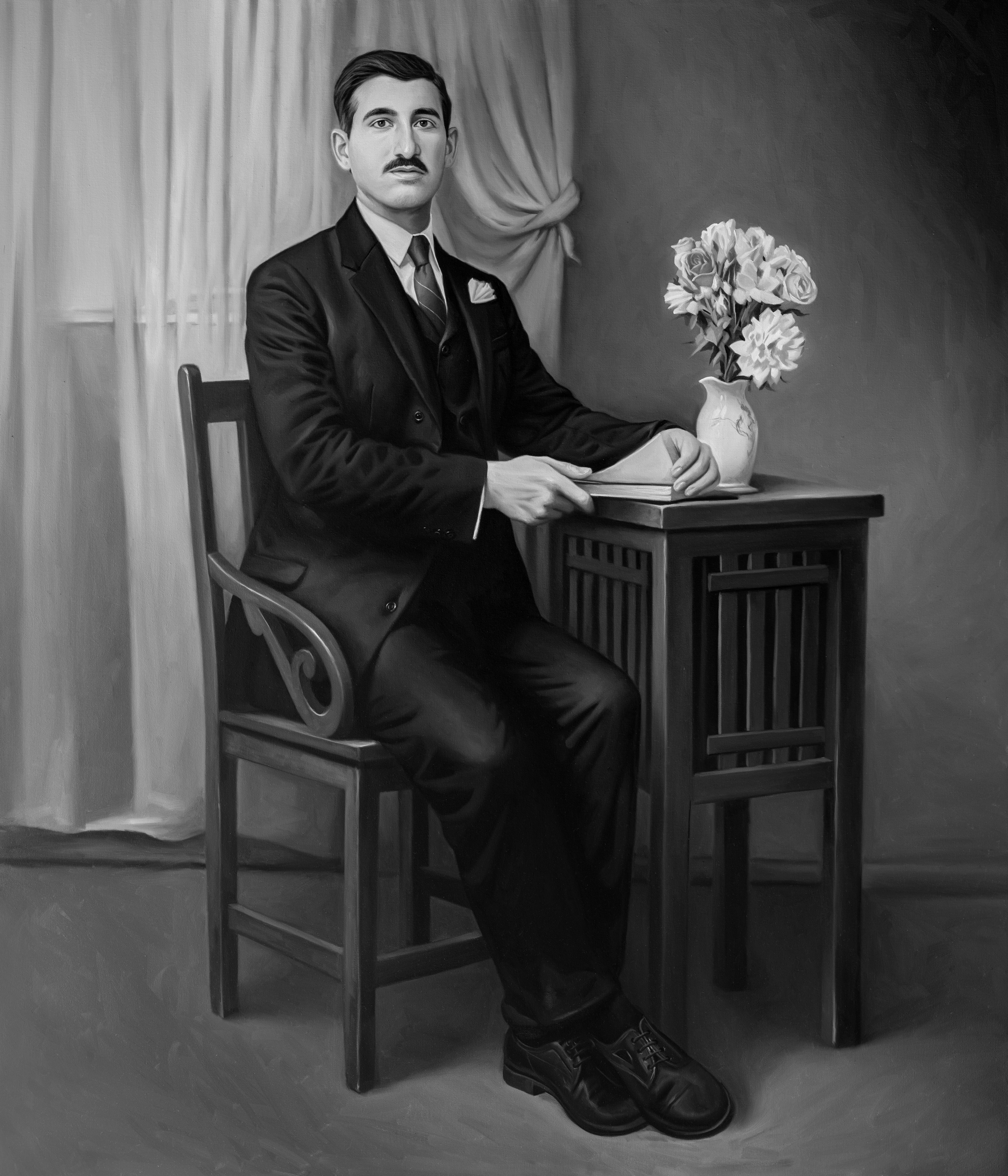 الوجيه محمد بك العياش، سياسي ومناظل وأديب من مدينة دير الزور حكم عليه الفرنسيين بالسجن لمدة 20 عاماً في جزيرة أرواد وحكمو على أخيه محمود العياش بالإعدام ونفو جميع أسرة عياش الحاج إلى مدينة جبلة السورية عام 1925.